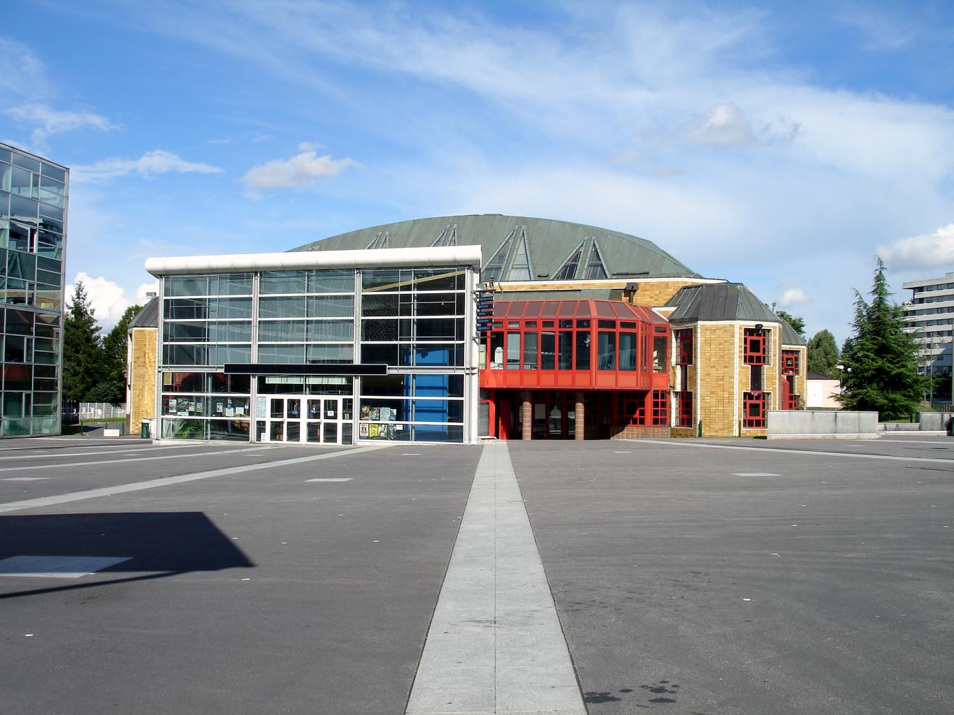 L'espace Saint-Exupéry à Franconville (Val-d'Oise), France Le centre culturel comprend la mediathèque, la salle polyvalente et la salle d'expositions Giacometti Juillet 2007 Photo personnelle (own work) de Clicsouris